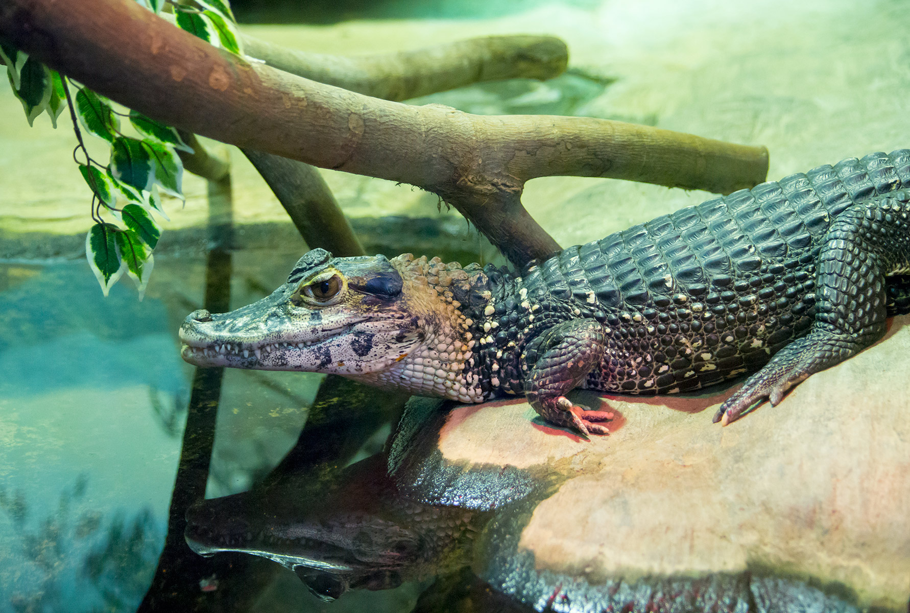 Черный кайман в Московском зоопарке